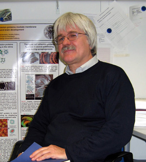 Karl-Friedrich Fischbach, Professor am Institut für Biologie III der Albert-Ludwigs-Universität Freiburg